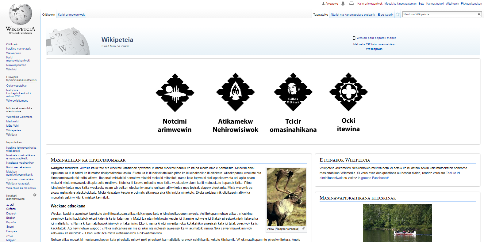 Snímek obrazovky Atikamekské Wikipedie